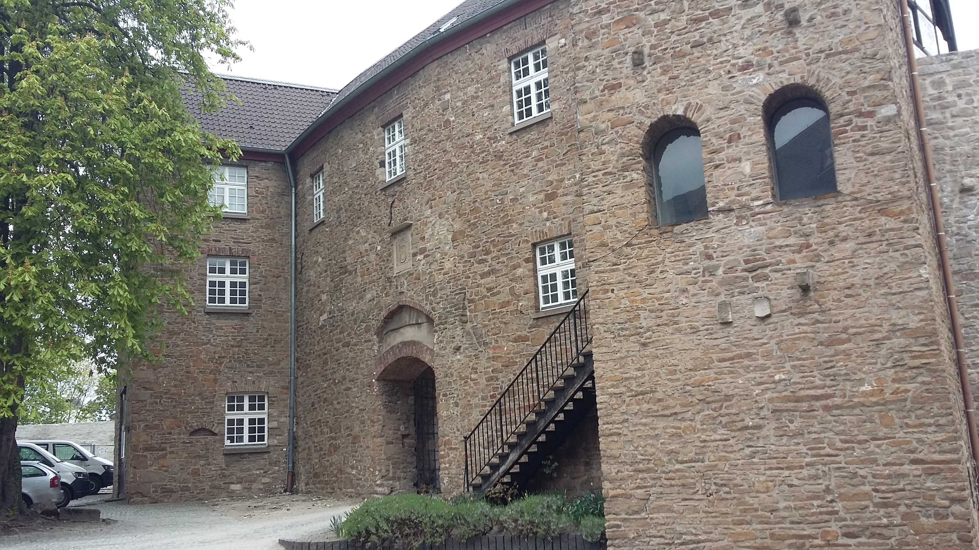 Schloss Broich